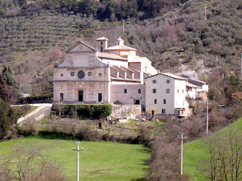 Spoleto, chiesa di San Pietro